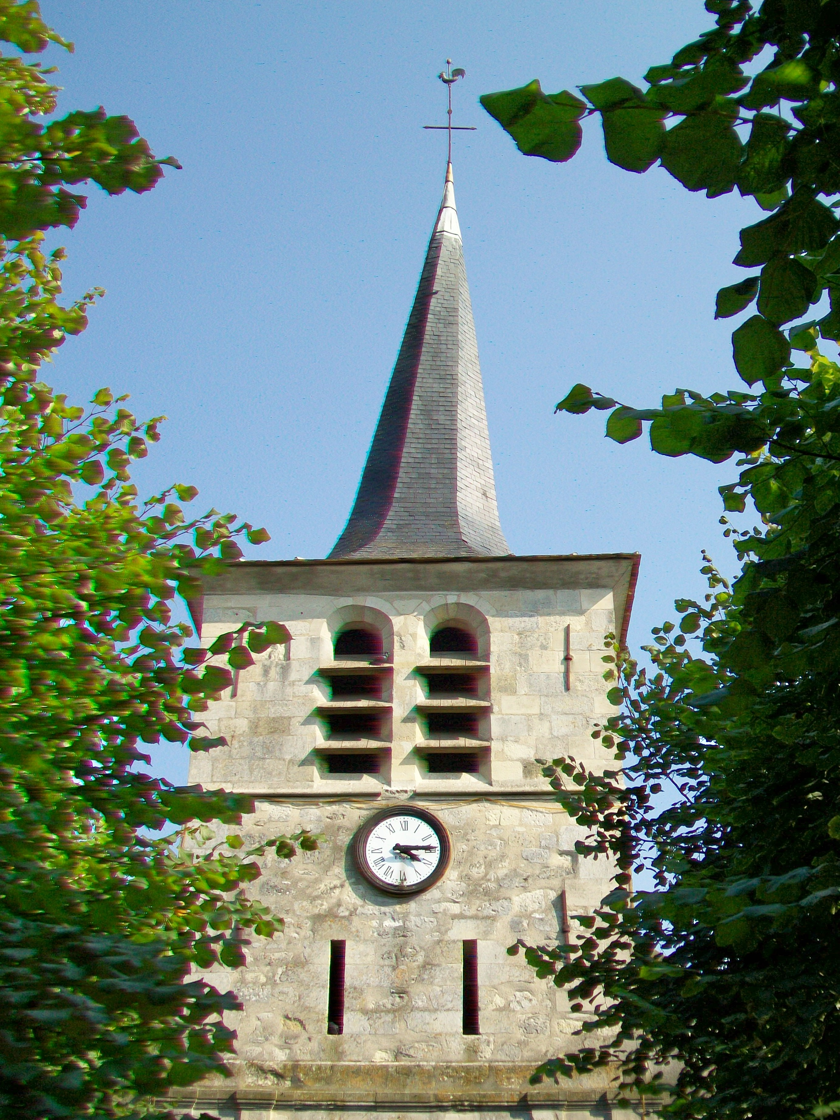 La partie supérieure du clocher, côté ouest.